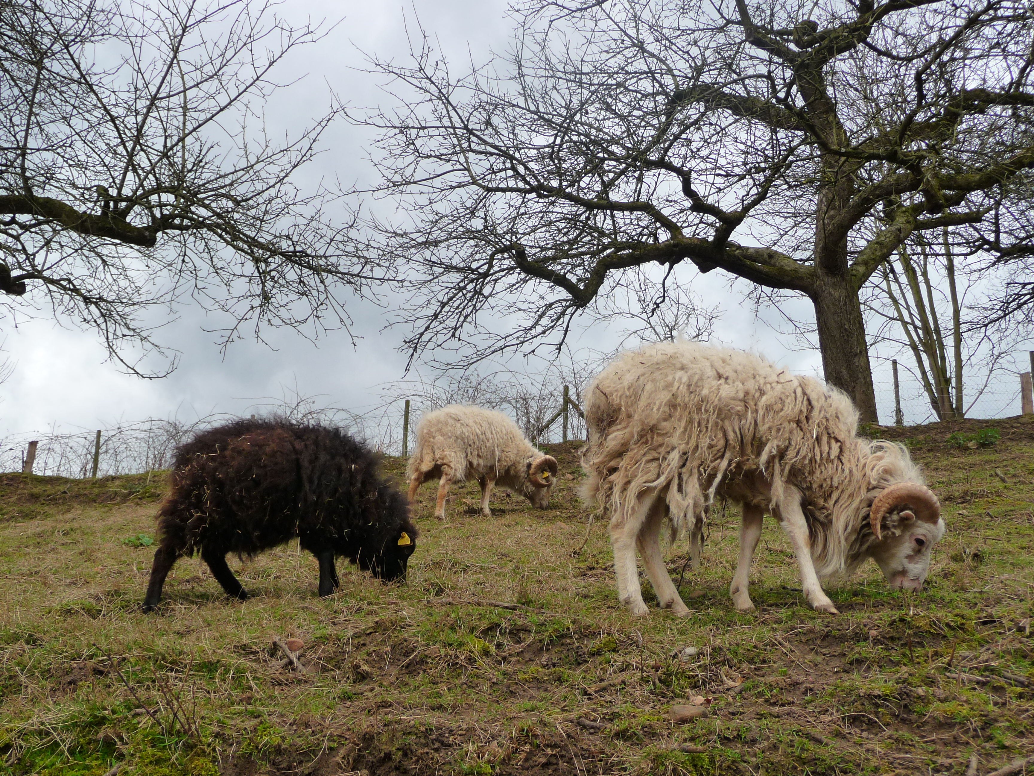 Weidende Ouessant-Schafe (Ushant), fotografiert im Heidelberger Stadtteil Ziegelhausen (Baden-Württemberg, Deutschland)